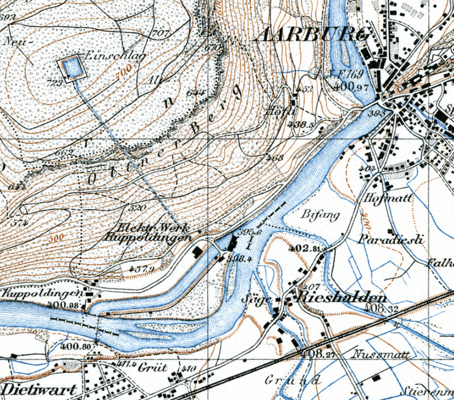 Darstellung des Elektrizitätswerks Ruppoldingen auf der Landeskarte 1:25.000. Datenstand 1931. Neben dem 1925 erneuerten Ausleitungskraftwerk mit Maschinenhaus am östlichen Ende des Kanals ist auch das Pumpspeicherkraftwerk mit dem Oberbecken auf dem Oltener Berg zu erkennen.